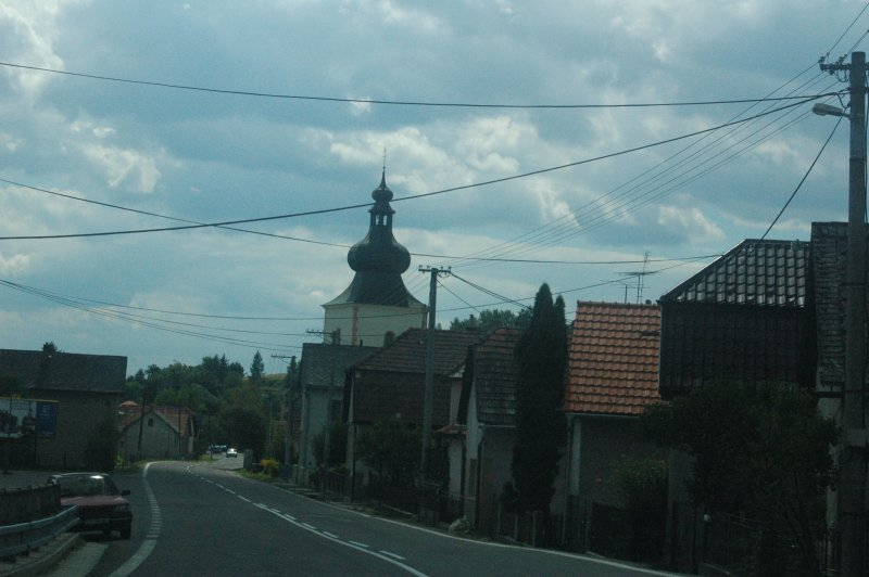 Kľačno